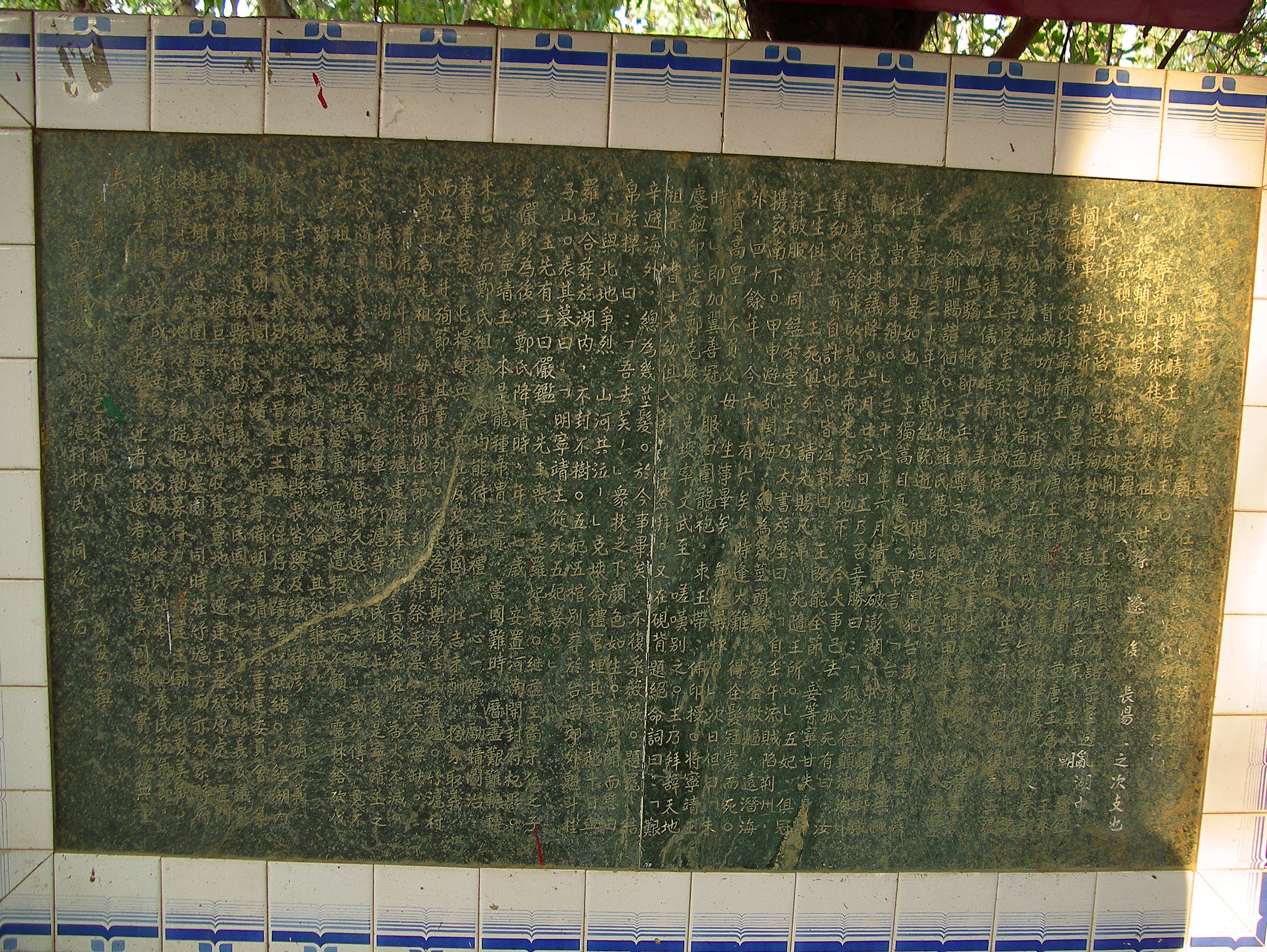 寧靖王墓誌